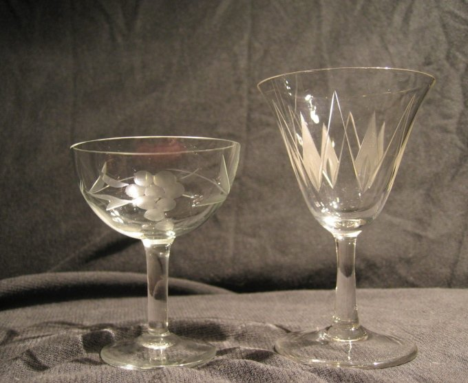 Likörgläser aus Bleikristall mit eingeätzten Mustern